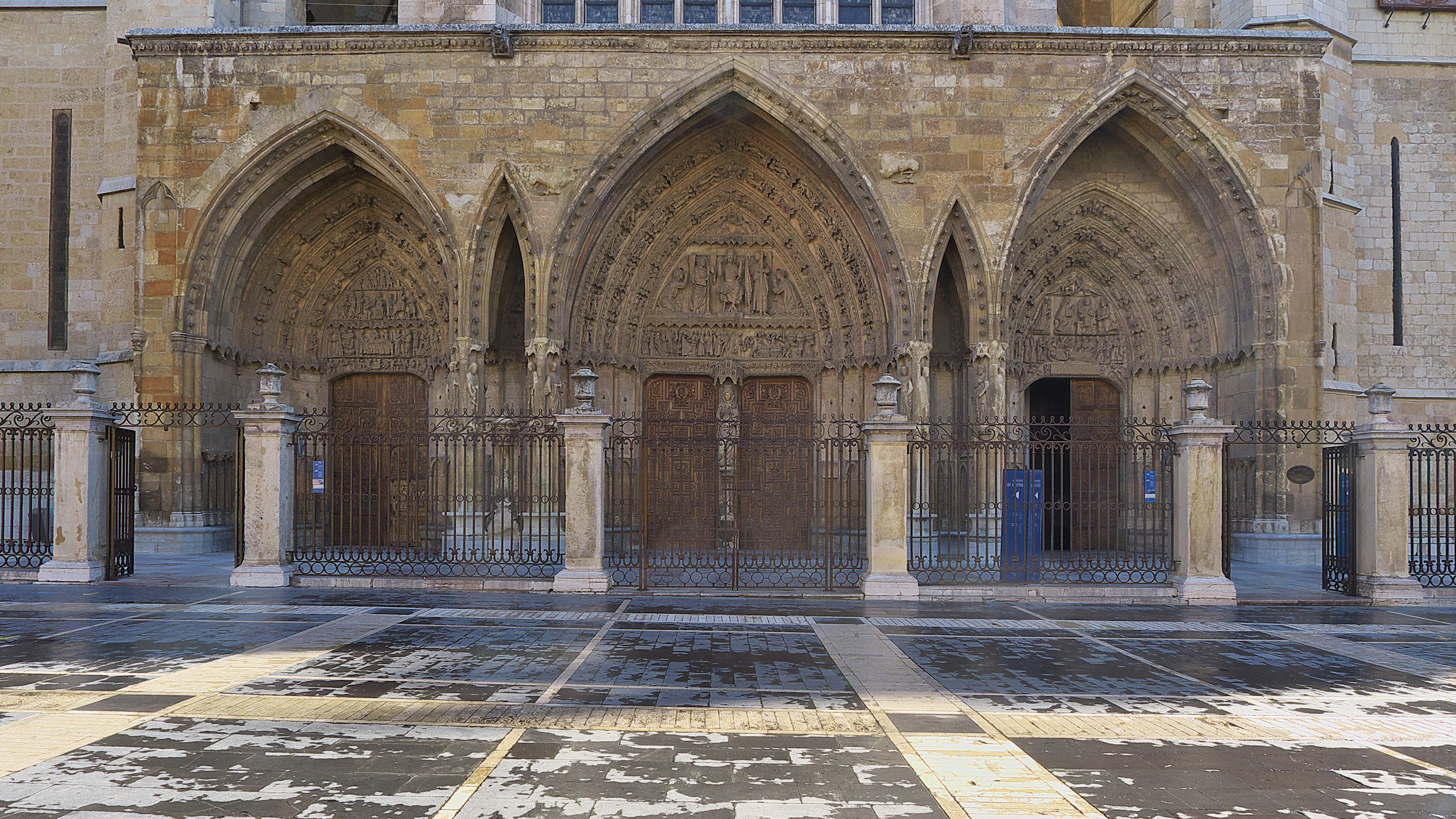 Pórtico principal situado en la fachada occidental (1260-1280). Al igual que en la etapa románica, este espacio será utilizado tanto para lo litúrgico, como para lo cívico. La composición con tres portadas recuerda la influencia artística de la Catedral de Chartres.